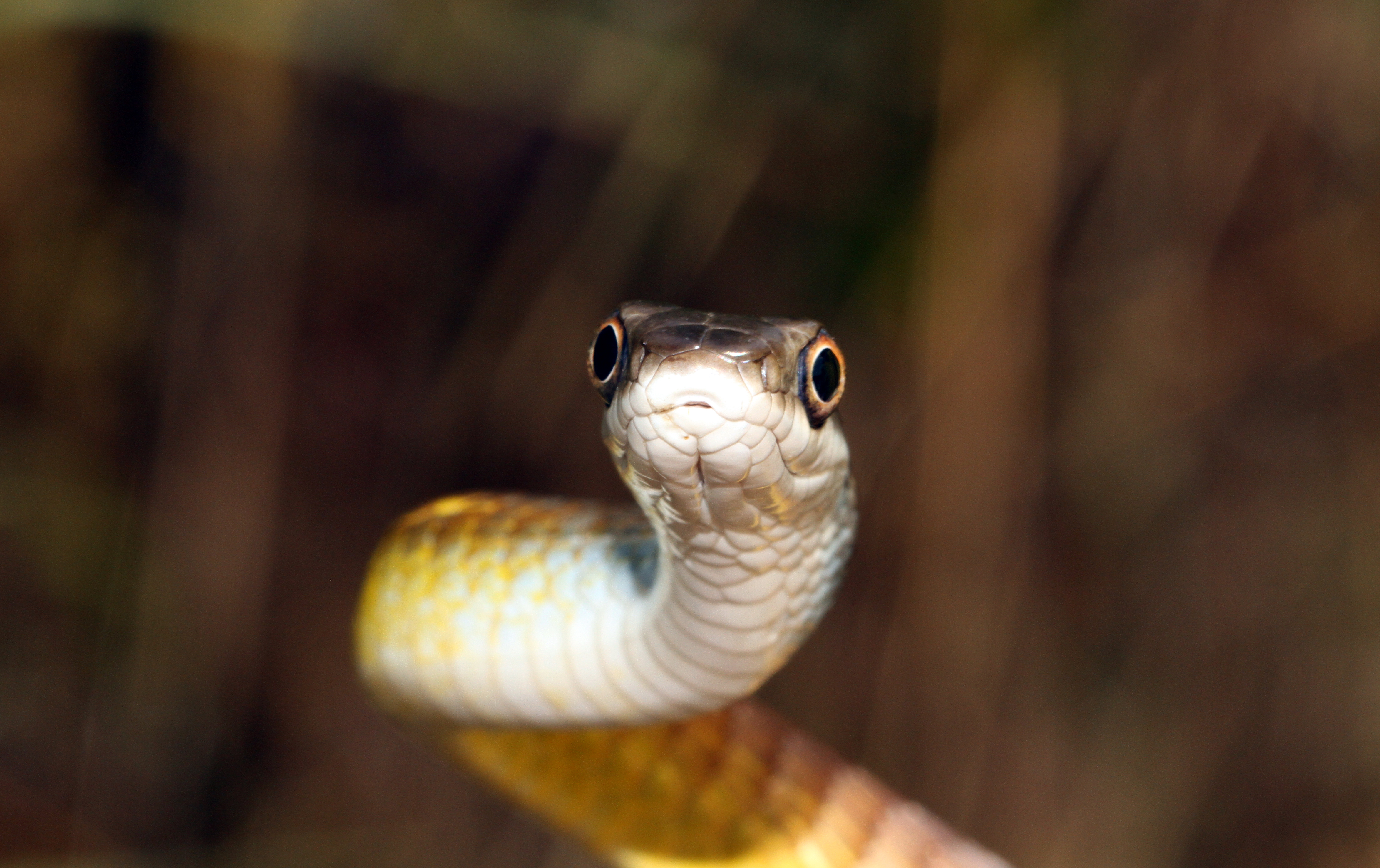 Kakadu NT